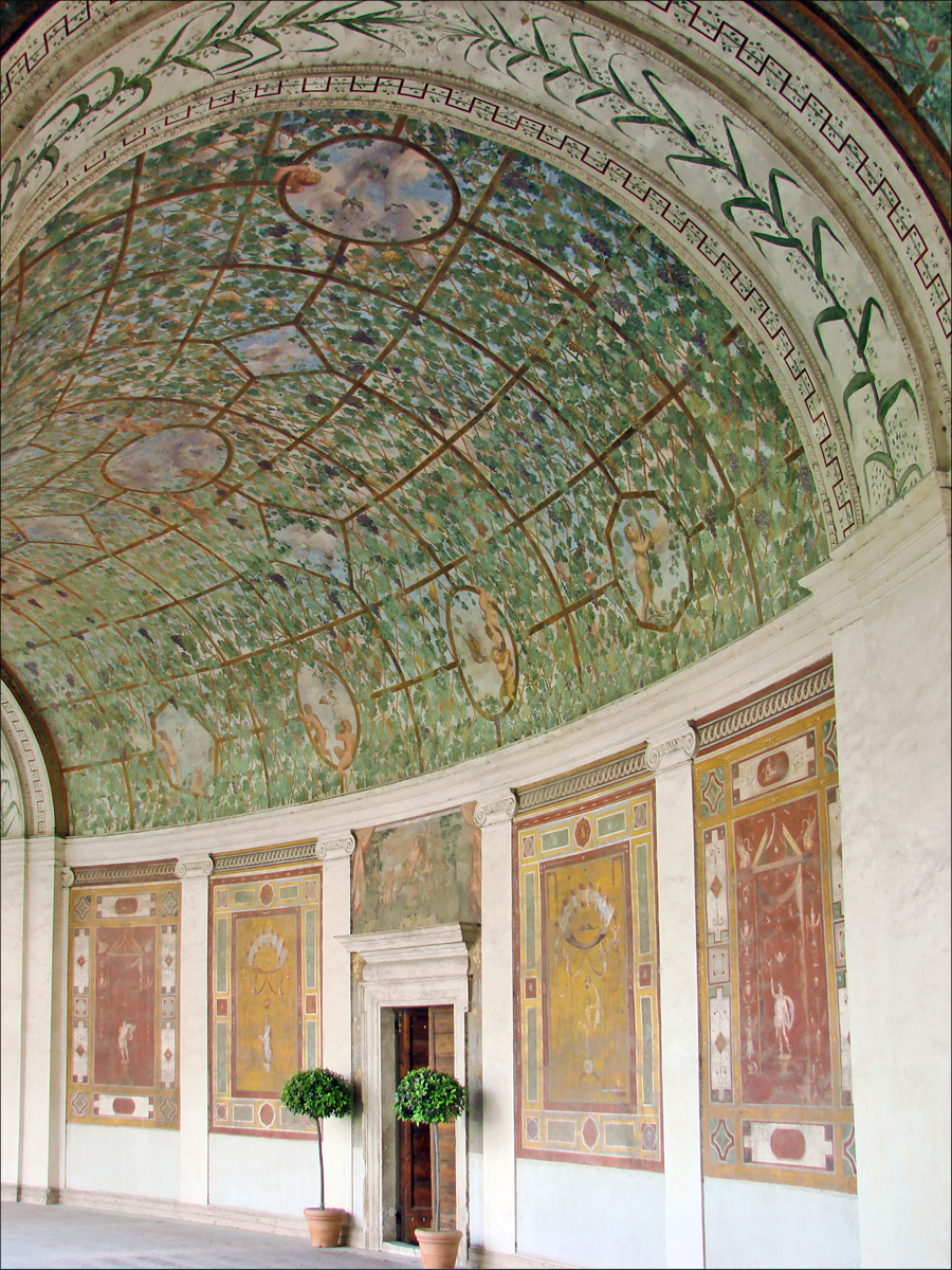 L'intérieur du portique en hémicycle à l'entrée de la villa Giulia La Villa Giulia a été édifiée dès 1551 à la demande du Pape Jules III (1550-1555) qui a fait appel à trois architectes éminents : Vasari, Vignole et Ammannati. La villa est dotée d'une première cour intérieure avec un portique en hémicycle dont la voute est décorée à fresque. Les peintures murales imitent une tonnelle garnie de sarments de vigne, de rosiers et de jasmin. Les murs sont décorés de grotesques. En 1552, Bartolomeo Ammannati a réalisé un deuxième espace doté d'une loggia avec un escalier en fer à cheval, d'un nymphée avec rocailles, fausses grottes et cariatides, le tout décoré de sculptures romaines. Les deux allégories fluviales représentent l'Arno et le Tibre. Au 20ème siècle pour développer le musée national étrusque, créé initialement en 1889, deux ailes ont été ajoutées à la villa. Le temple étrusque d'Alatri a été reconstitué dans le jardin de droite. Les photographies n'étant pas permises à l'intérieur du musée (on ne comprend pas pourquoi car il n'y a aucun problème de droit d'auteur et de risque de dégradations), on se contentera d'images du jardin et du bâti.